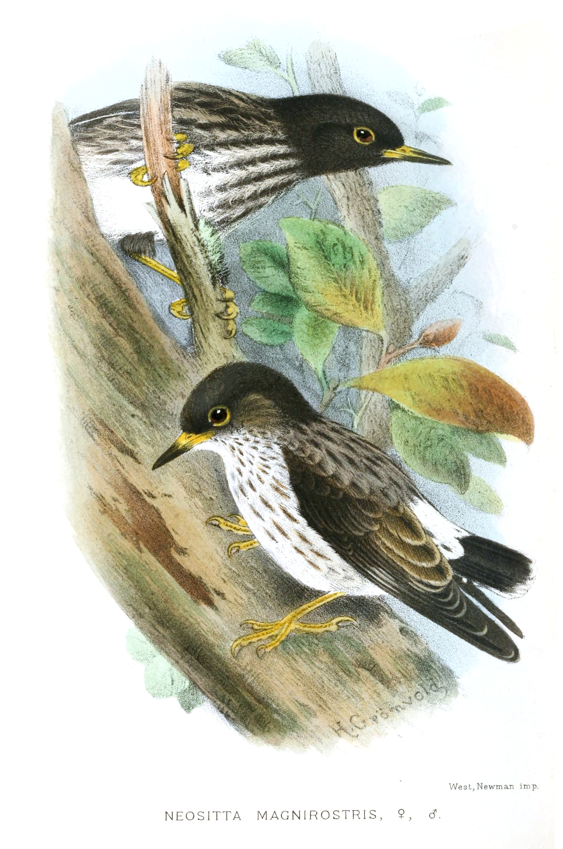 Neositta magnirostris=Daphoenositta chrysoptera